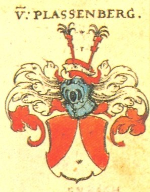 Wappen des fränkischen Adel- und Rittergeschlechts Plassenberg.